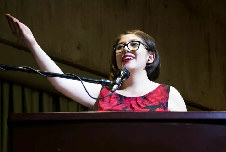 Discurso formal Uso de gestos y contacto visual